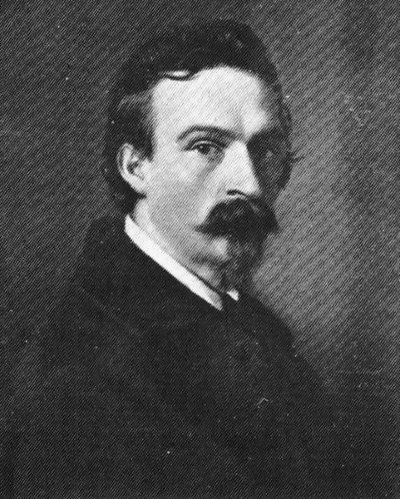 Portret Adelberta Wölfla autorstwa Emila Brehmera 1855 roku